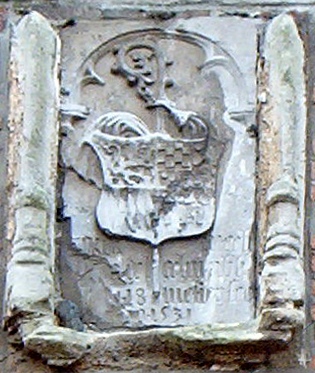 Wapenschild van abdis Mechtildis de lechy op noordgevel poortgebouw abdij van herkenrode (Hasselt)